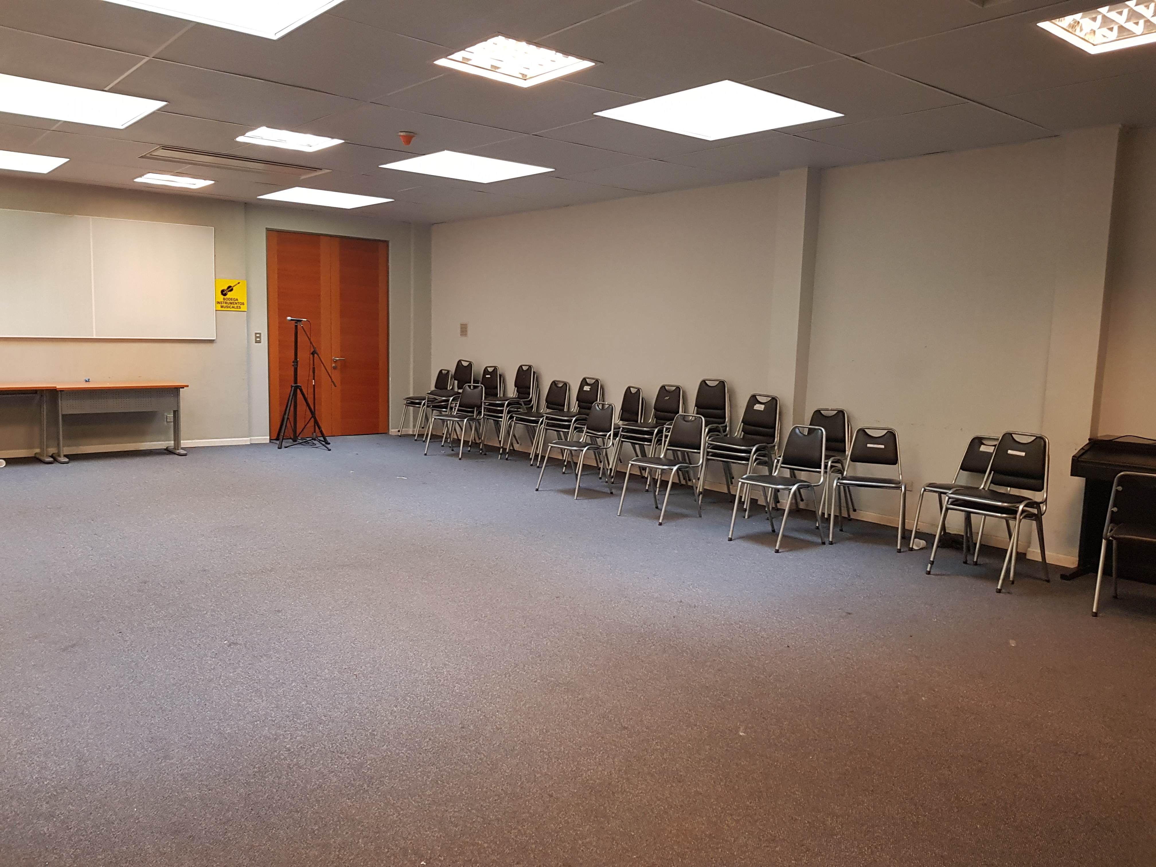 Fotografía de la sala de música del Centro Cultural Teatro Serrano de la Provincia de Melipilla, Chile